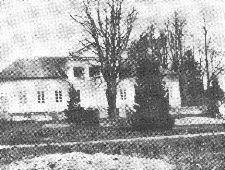 Šumsko dvaro sodyba 1914 m.